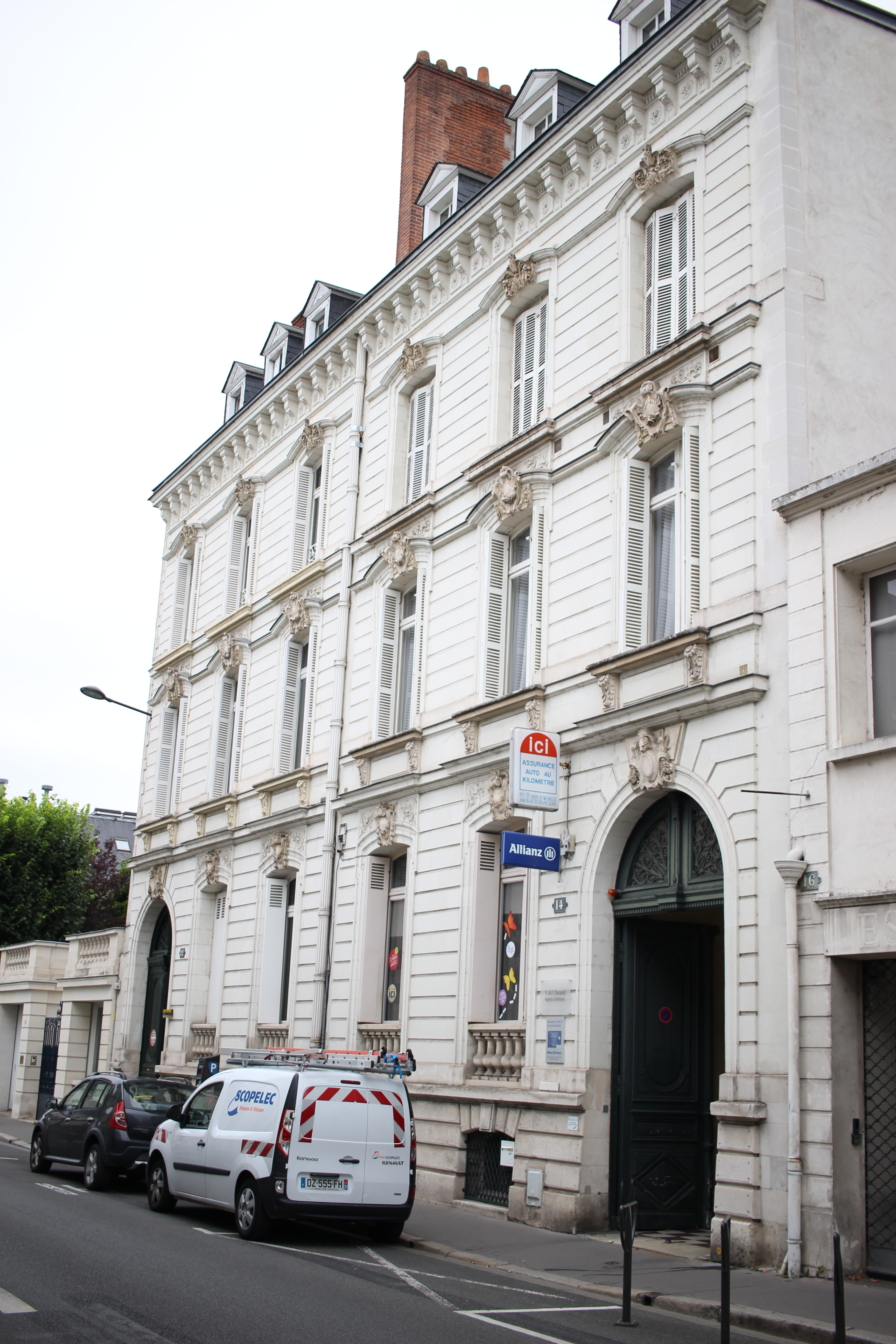 Hôtel (12 et 14 rue Émile Zola, Tours)